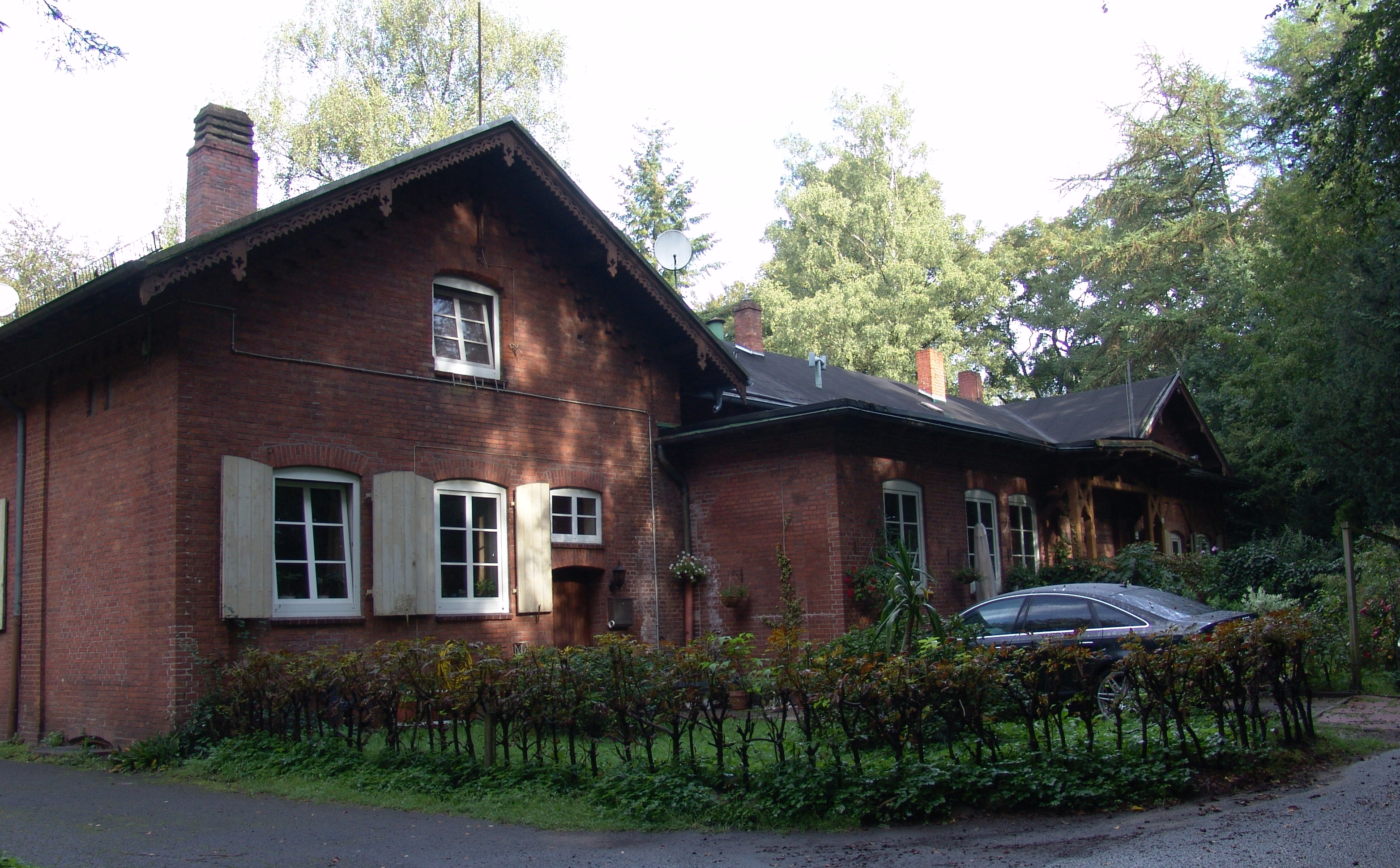 Wätjens Landgut, Altes Wirtschaftsgebäude in Bremen, Landrat-Christians-Straße 27, 29, 31, 33, 35, 37, 39, 41, 43.Das abgebildete Objekt ist ein geschütztes Kulturdenkmal in der Freien Hansestadt Bremen, mit der Nr. 1763 beim Landesamt für Denkmalpflege registriert.